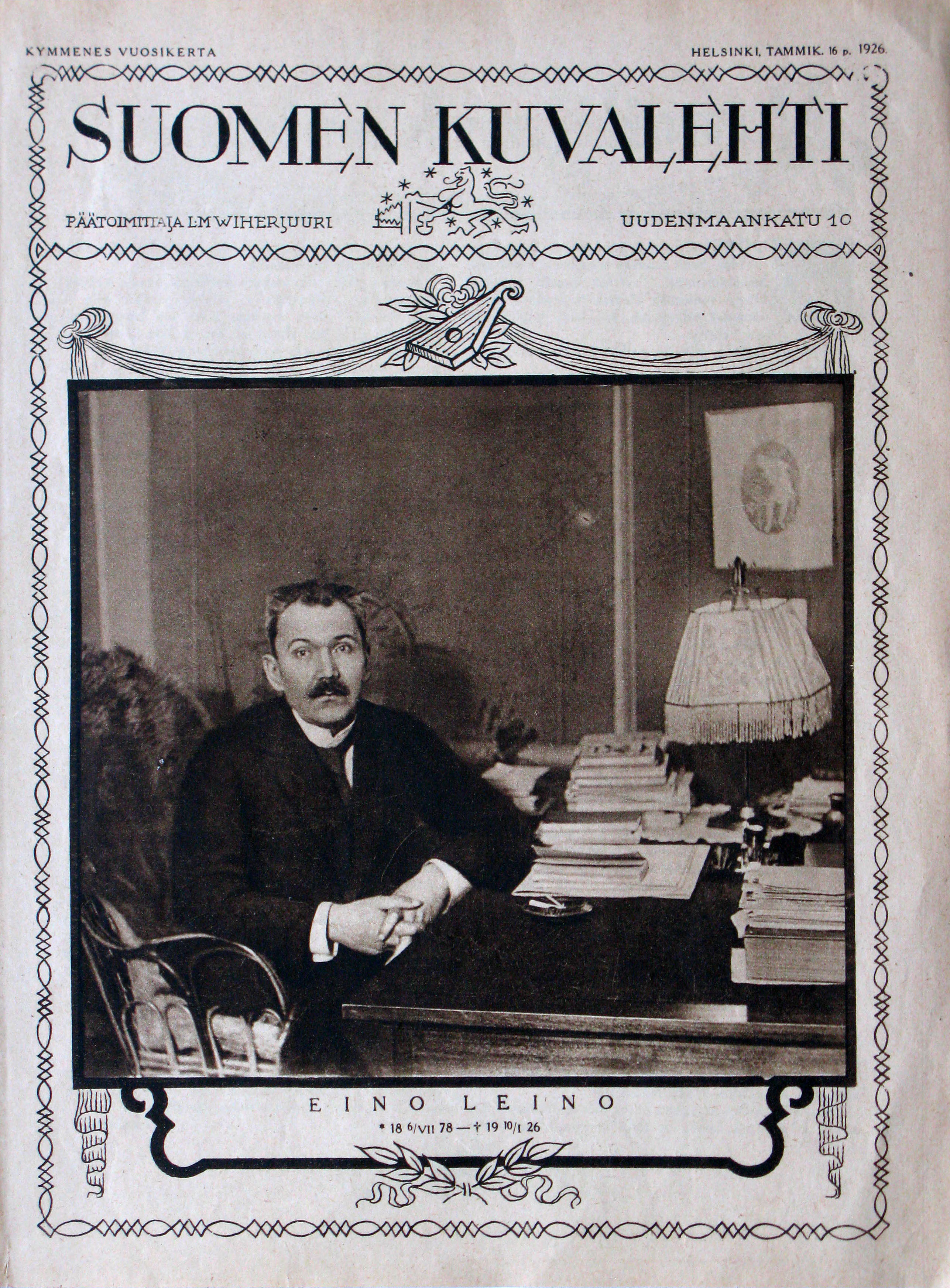 Eino Leinon kuolinuutinen Suomen kuvalehdessä 16. p. tammikuuta 1926